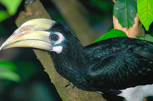 Oriental Pied Hornbill